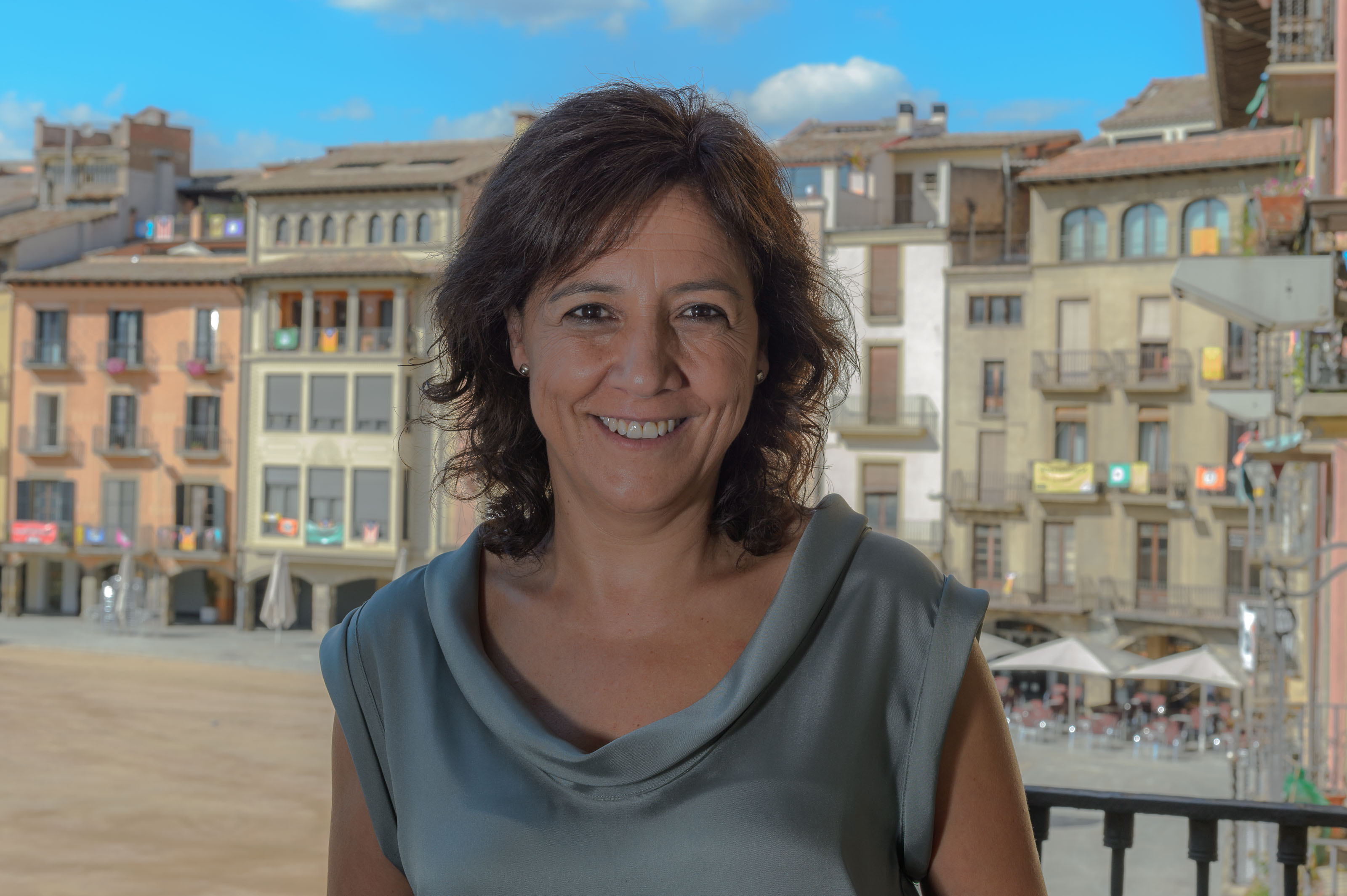 Anna Erra, alcaldessa de Vic, plaça Major, Vic, plaça Major de Vic